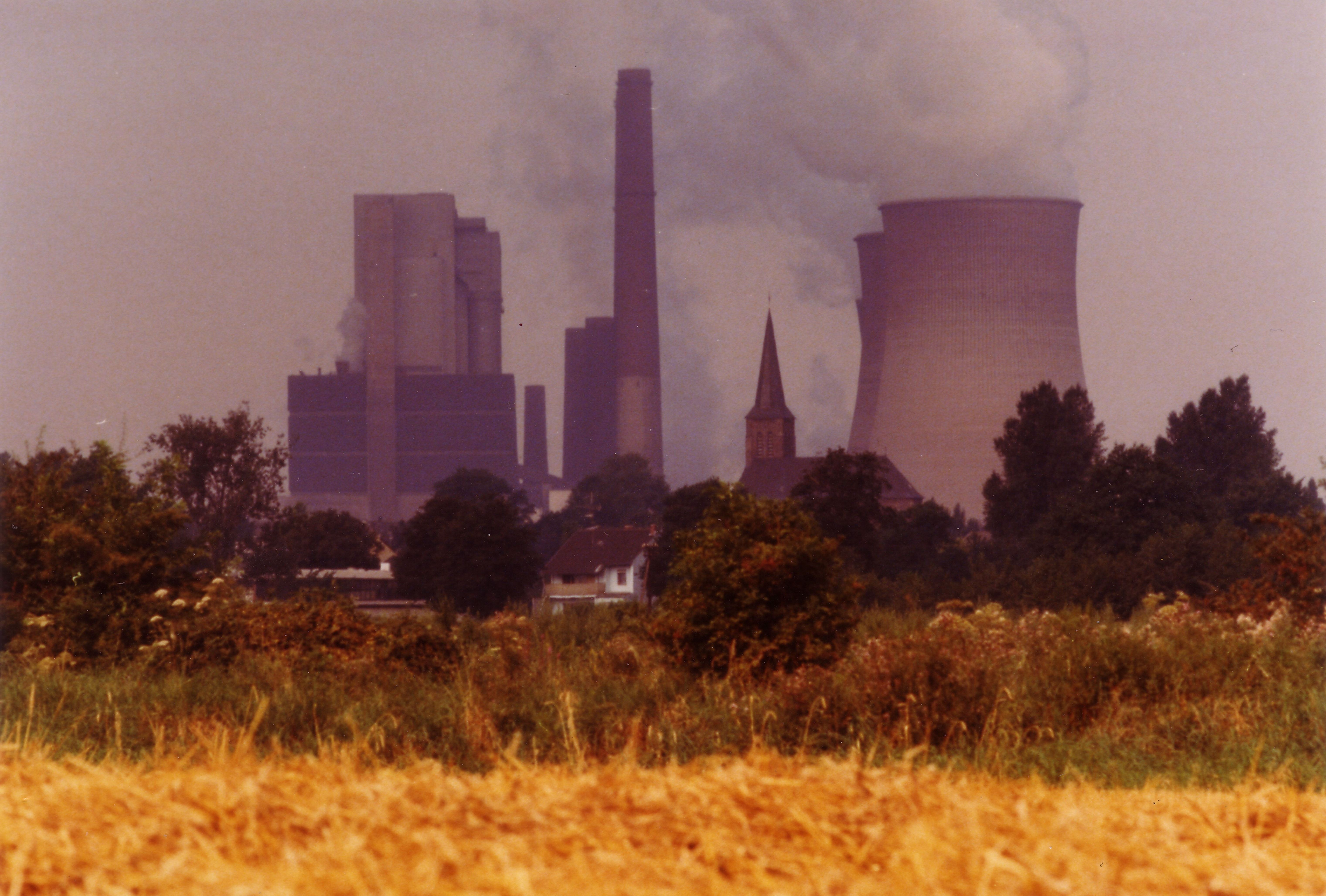 Pfarrkirche St. Nikolaus in Frenz, Gemeinde Inden, vor dem Kraftwerk Weisweiler; analoge Kamera Nikon FM 25.08.1980, eingescannt 25.09.2014 This is a photograph of an architectural monument.